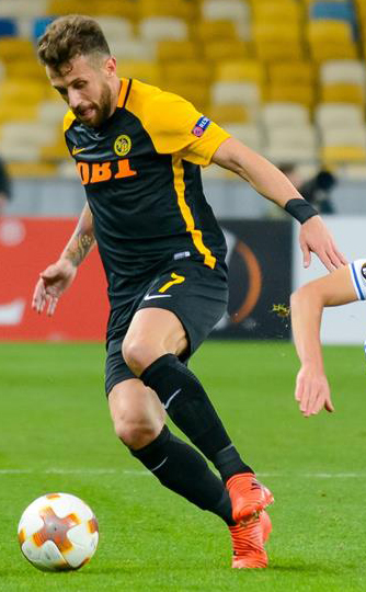 Динамо - Янг Бойз (2:2) фото с матча